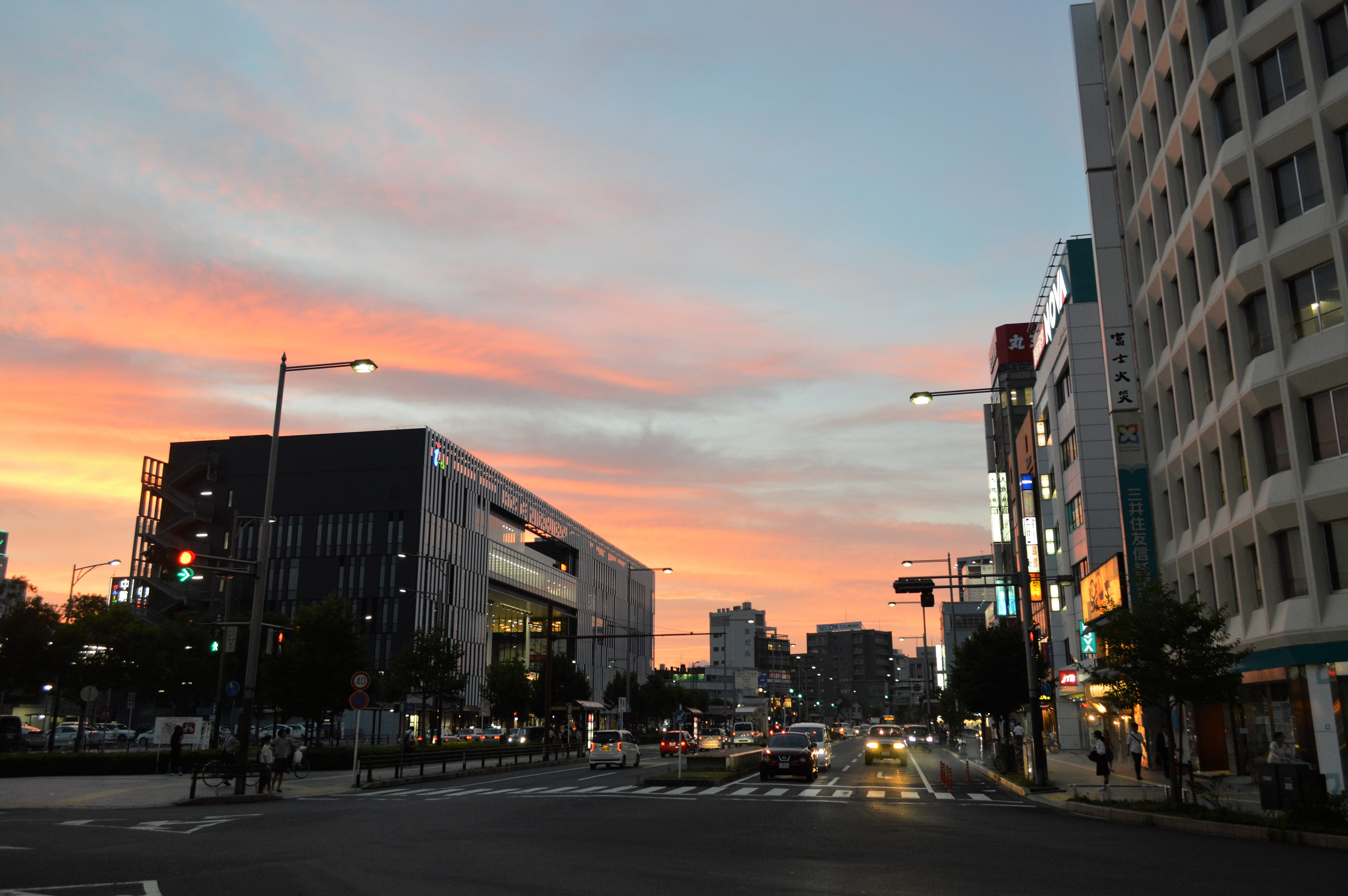 尾張一宮駅前ビル（i-ビル）。一宮市立中央図書館などが入っている。